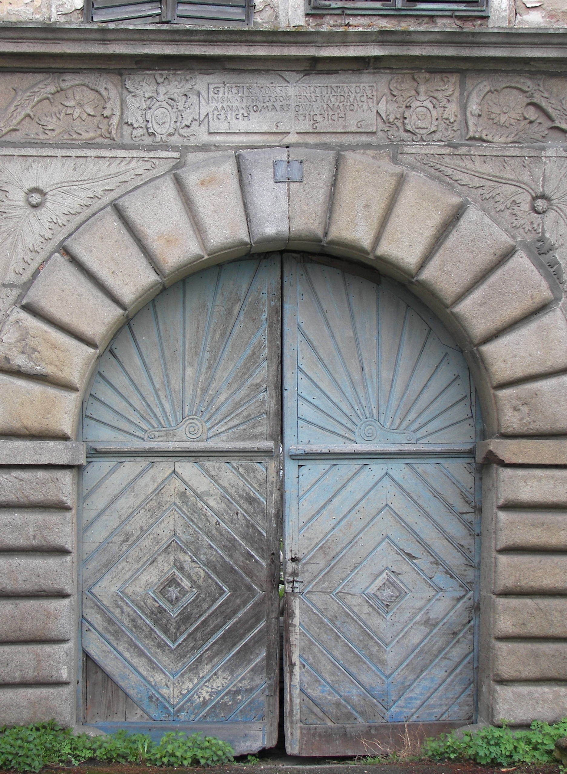 Komařice - zámecká brána